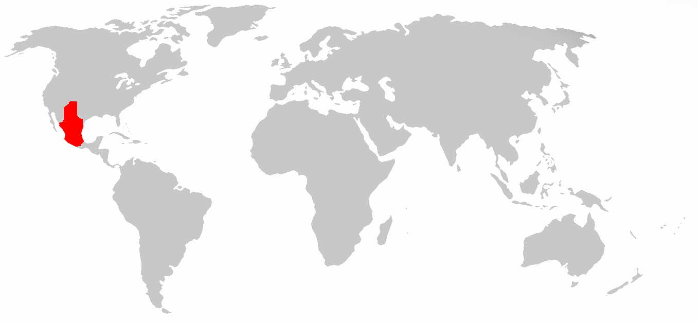 lizenz.